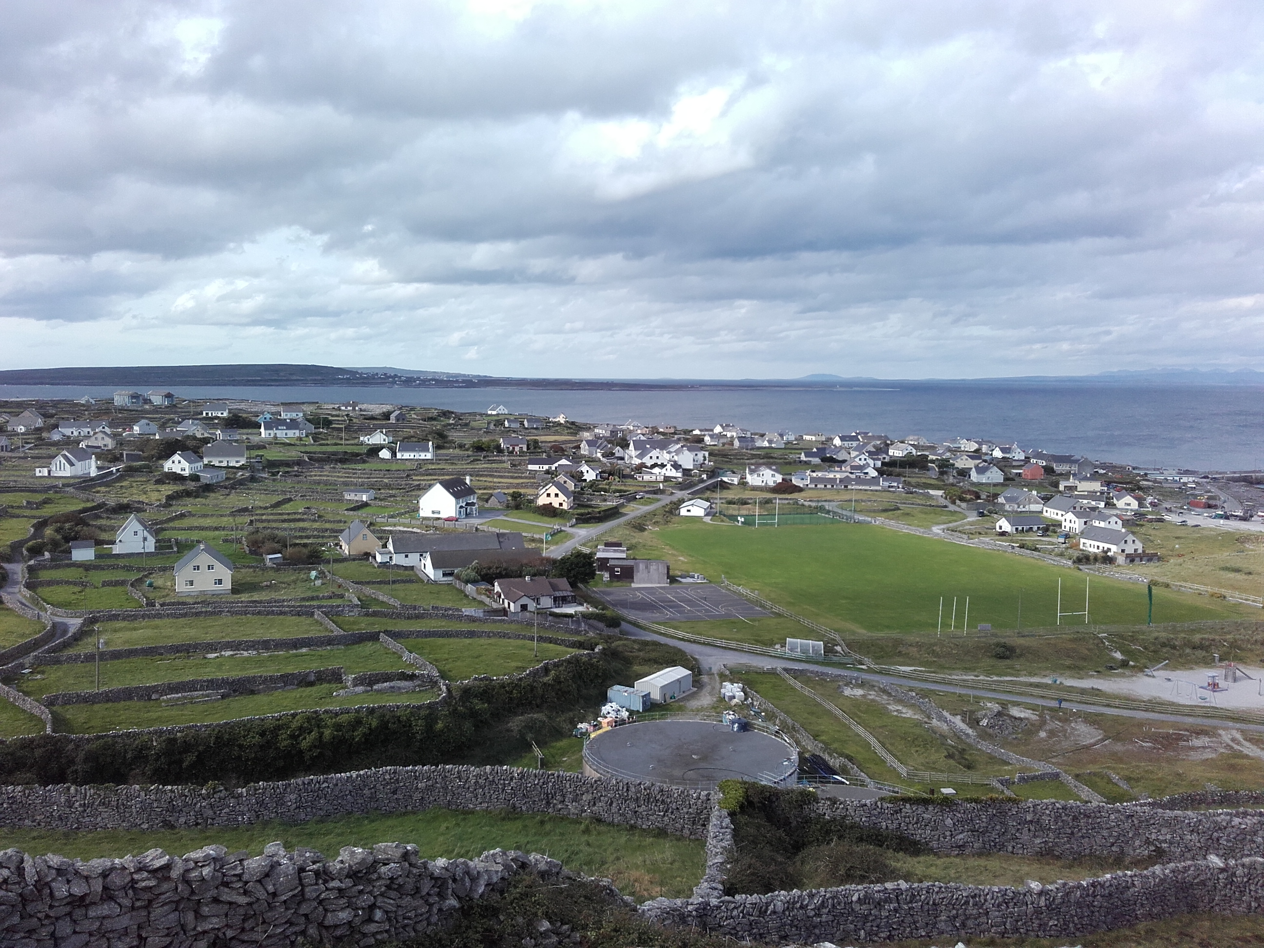 Inis Oírr e Inis Meáin ao fondo.